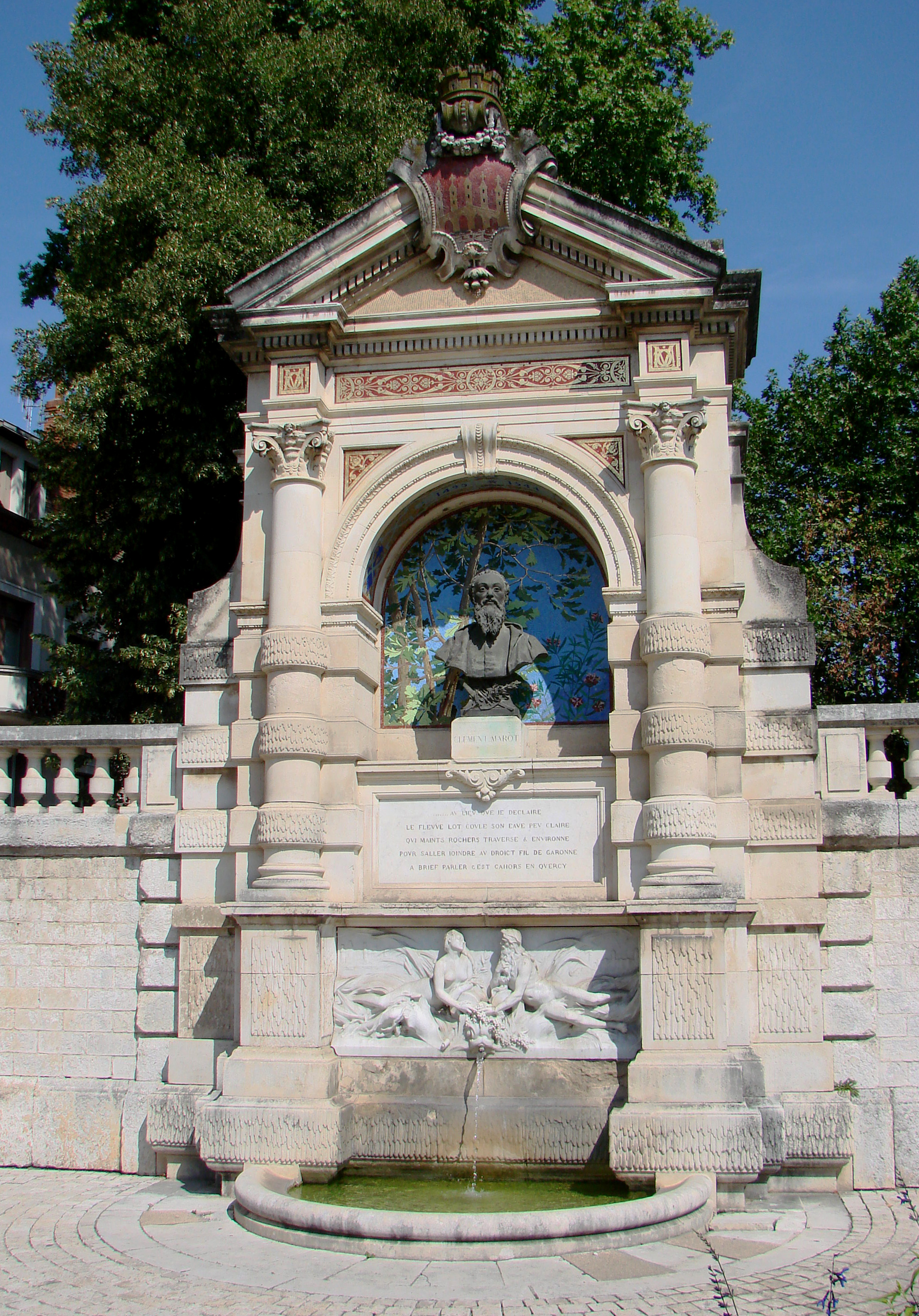 Buste de Clément Marot,fontaine à Cahors.Clément Marot est un poète français du XVIe siècle, protégé du roi de France François Ier. Il est né à Cahors pendant l'hiver 1496-1497 et est mort à Turin en 1544.